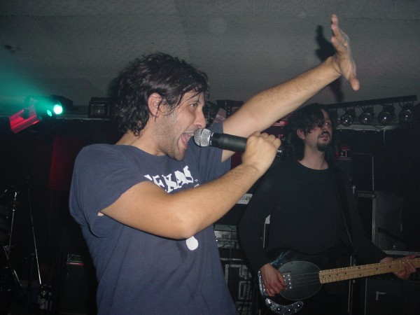 Sänger Aydo Abay und Bassist Carlos Ebelhäuser im Heidelberger Schwimmbad Musik Club, Okt. 2003